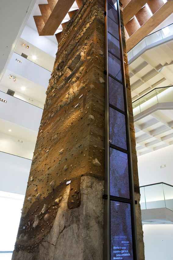 Eje vertebrador del Museo de Almeria